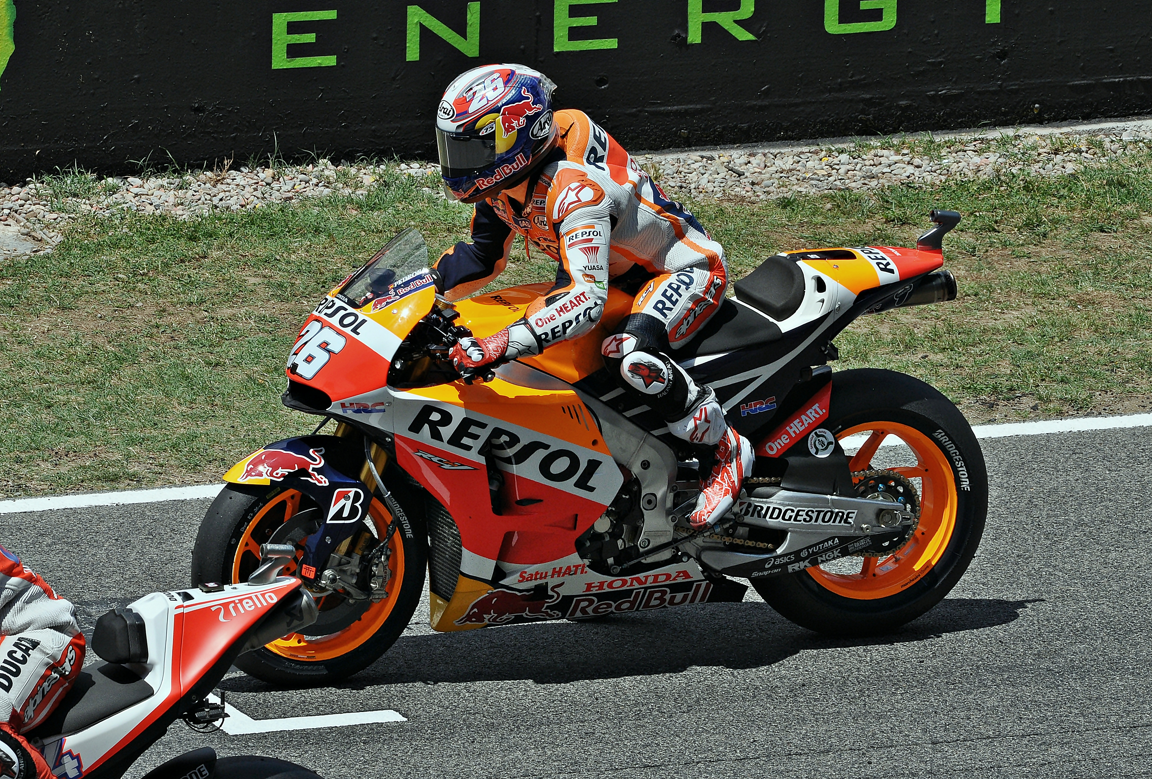 Gran premio de Cataluña